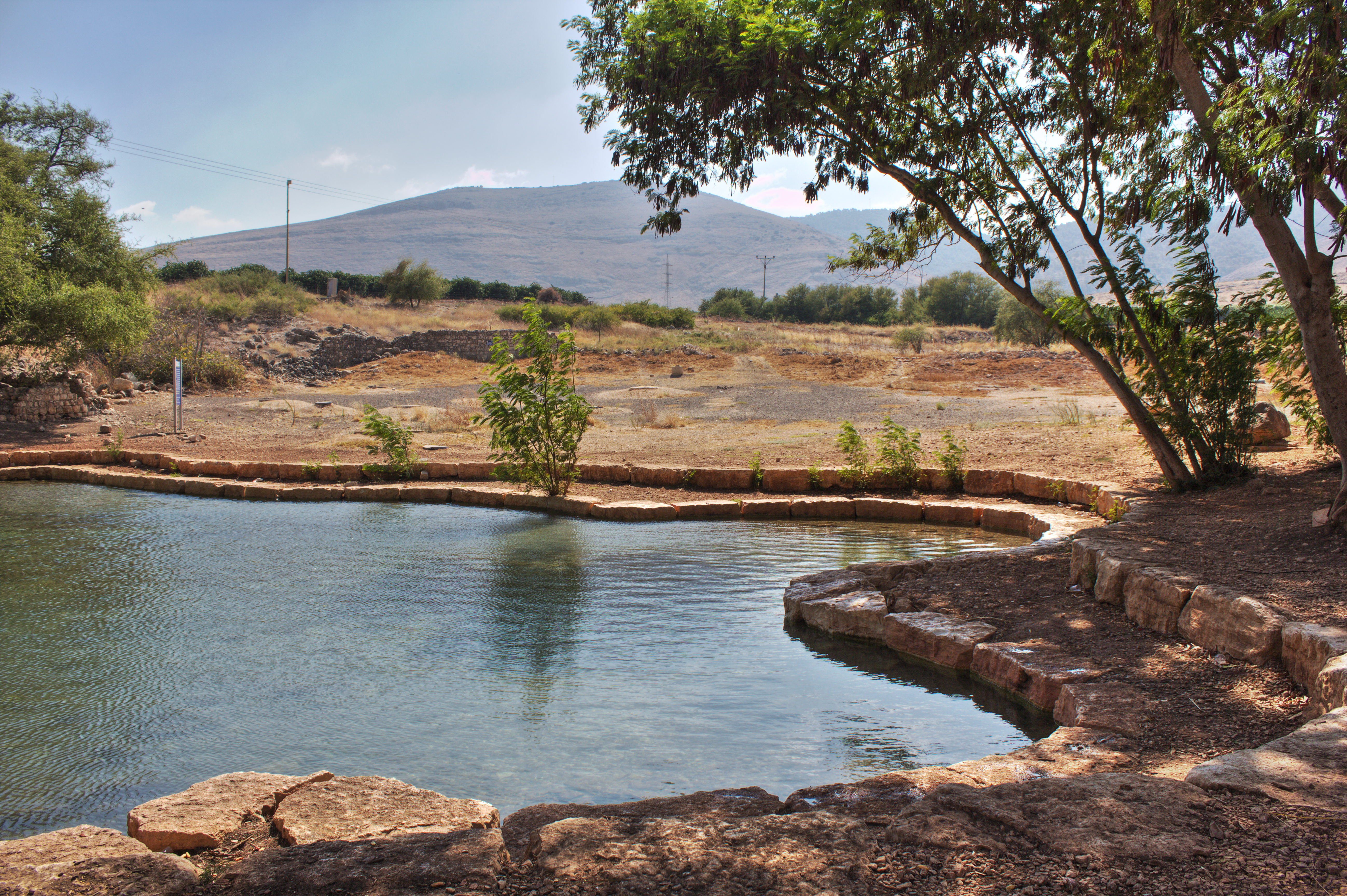 Ein Shokek spring, Israel